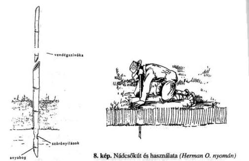 Nádcsőkút használata az Ecsedi lápon a XIX. században